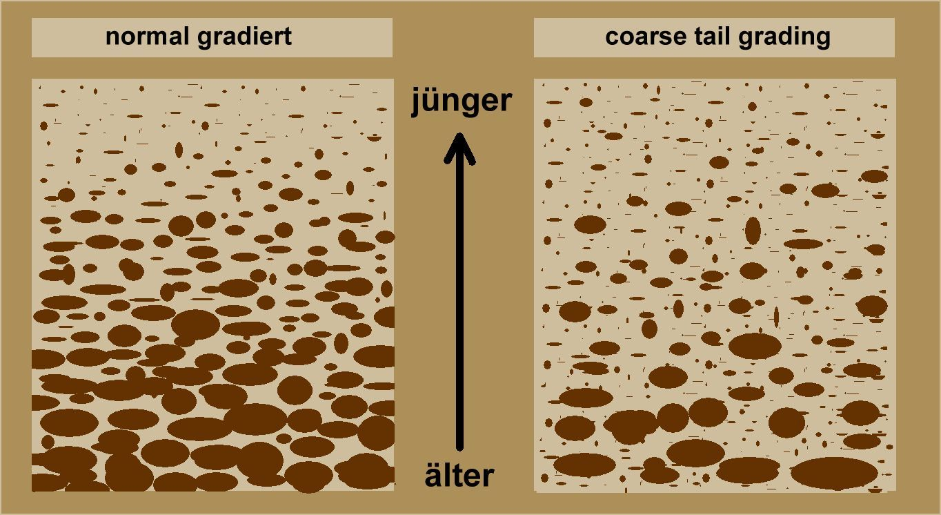 Schemaskizze gradierte Schichtung